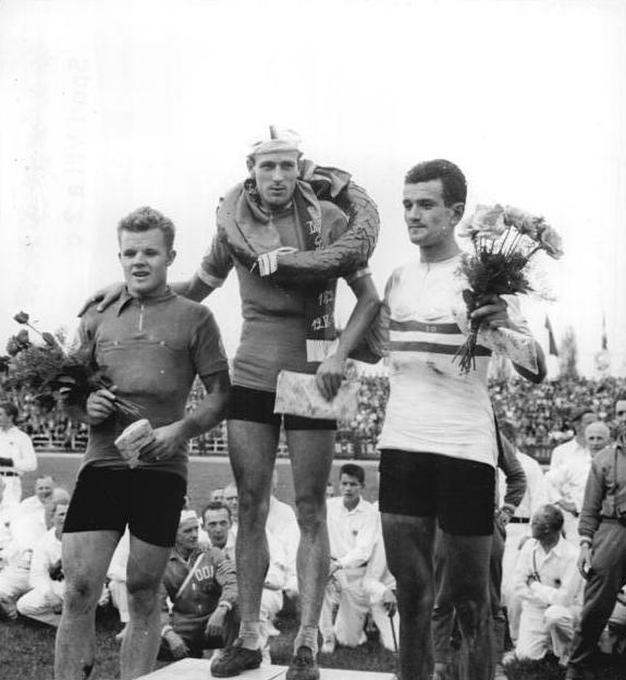 Hagen, Egon Adler, Török Zentralbild Wendorf Ks-Noa 13.5.1960 - XIII. Friedensfahrt 1960 - 9. Etappe. UBz: Während der Siegerehrung: vlnr: Hagen (DDR), Etappensieger Adler (DDR) und der Drittplazierte Török (Ungarn).